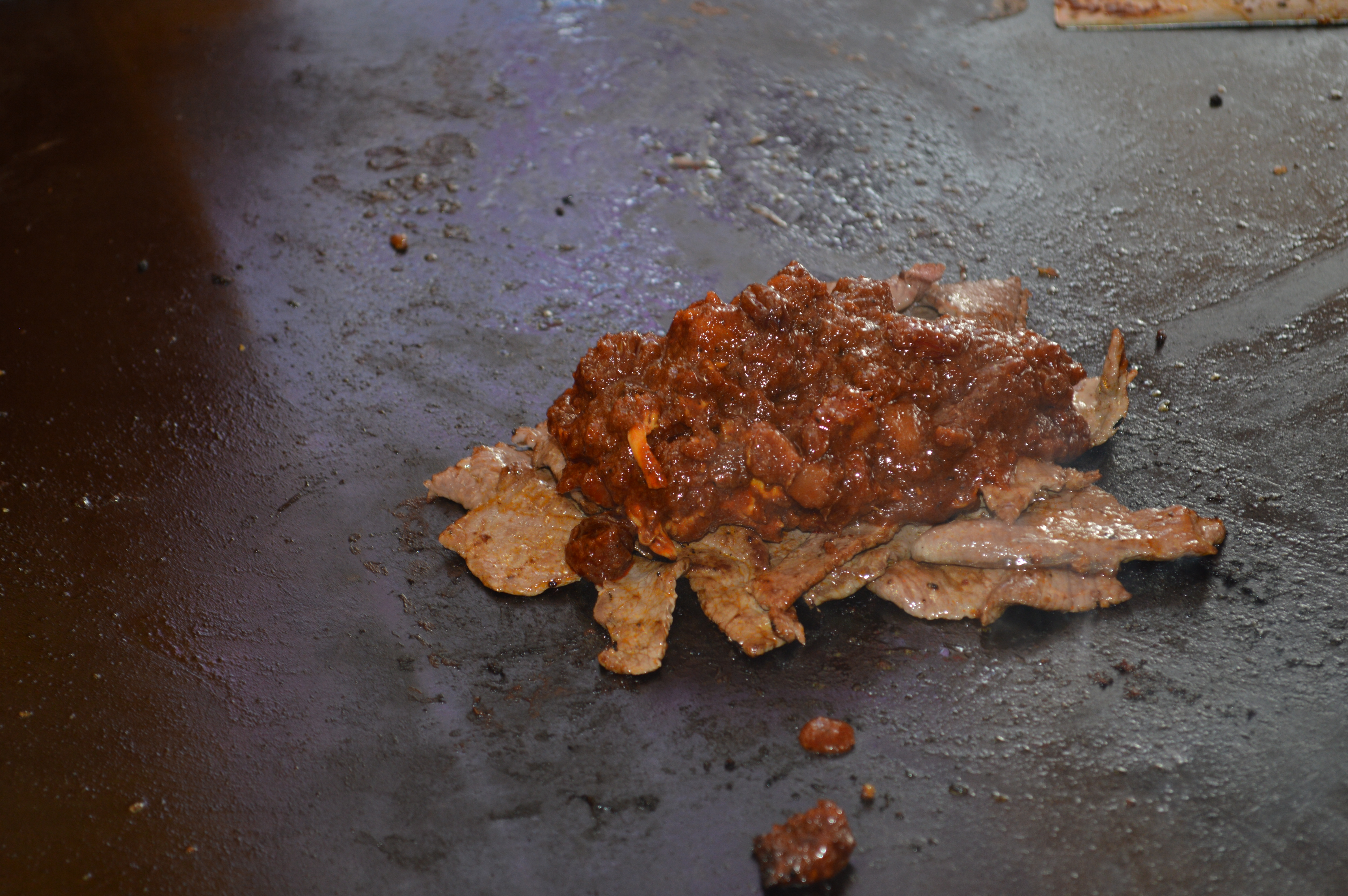 Filets of ostrich meat with "Christmas" adobo at the Feria de la Torta at the Venustiano Carranza borough hall in Mexico City